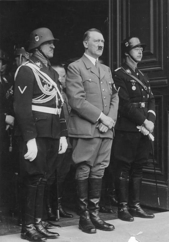 Zentralbild Adolf Hitler vor der Reichskanzlei an seinem Geburtstag 1937. Links: SS-Obergruppenführer Sepp Dietrich; rechts: SS-Reichsfüherr Heinrich Himmler [Scherl Bilderdienst]